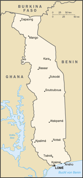 Karte von Togo